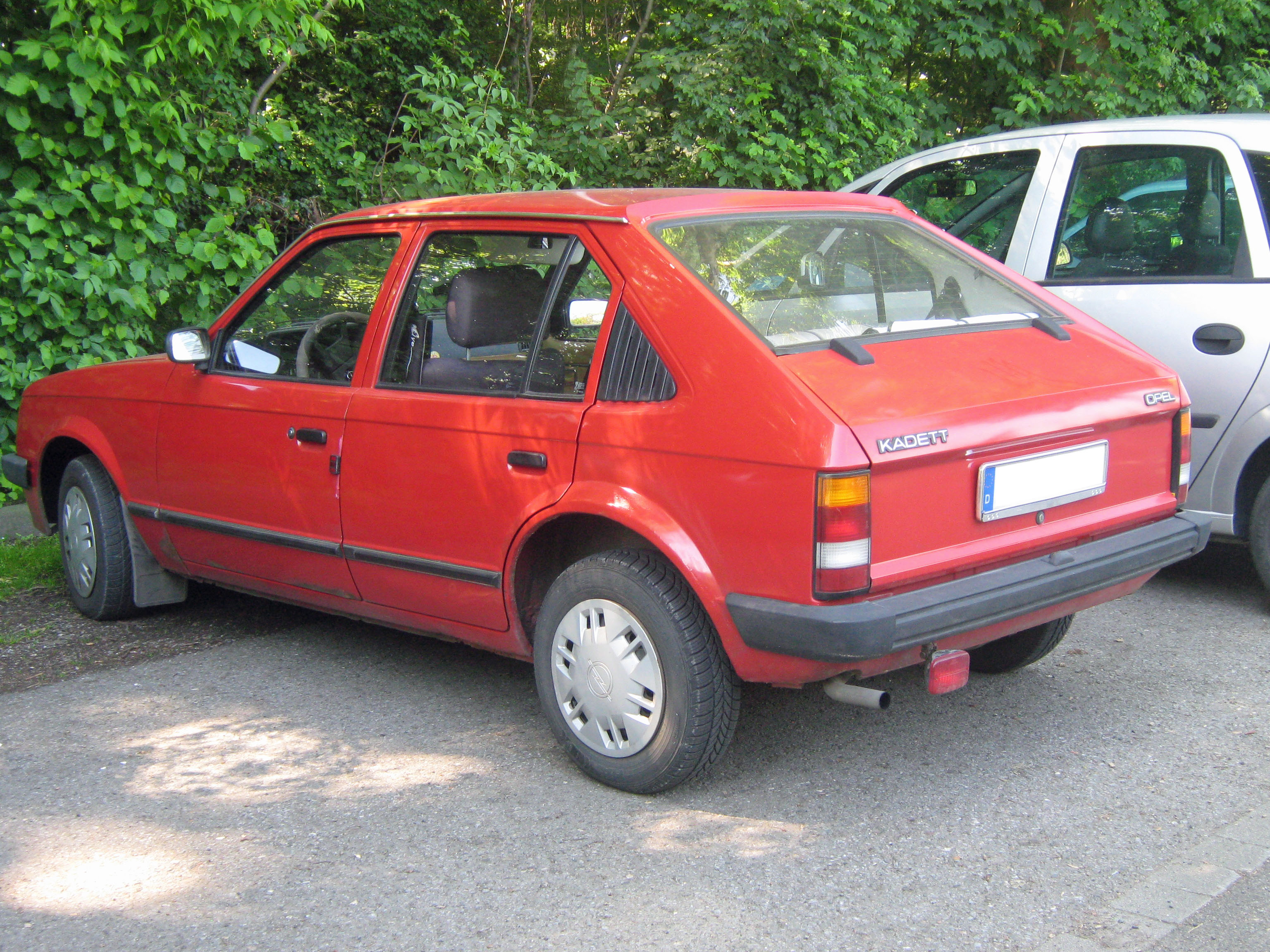 Opel Kadett D mit anfangs serienmäßiger (kurzer) Kofferraumklappe